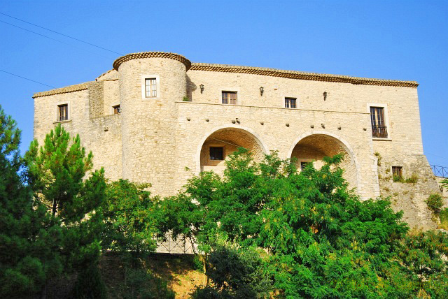 Castello Ducale di Casalduni (BN). Vista dal basso.